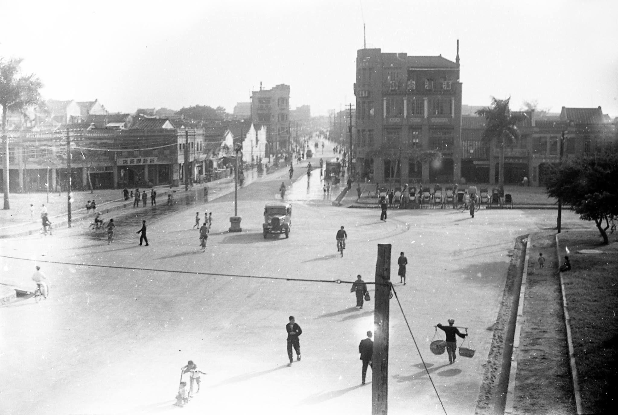 臺南西門圓環遠望（遠方中間建築物為醉仙閣，近處右者為寶美樓）。